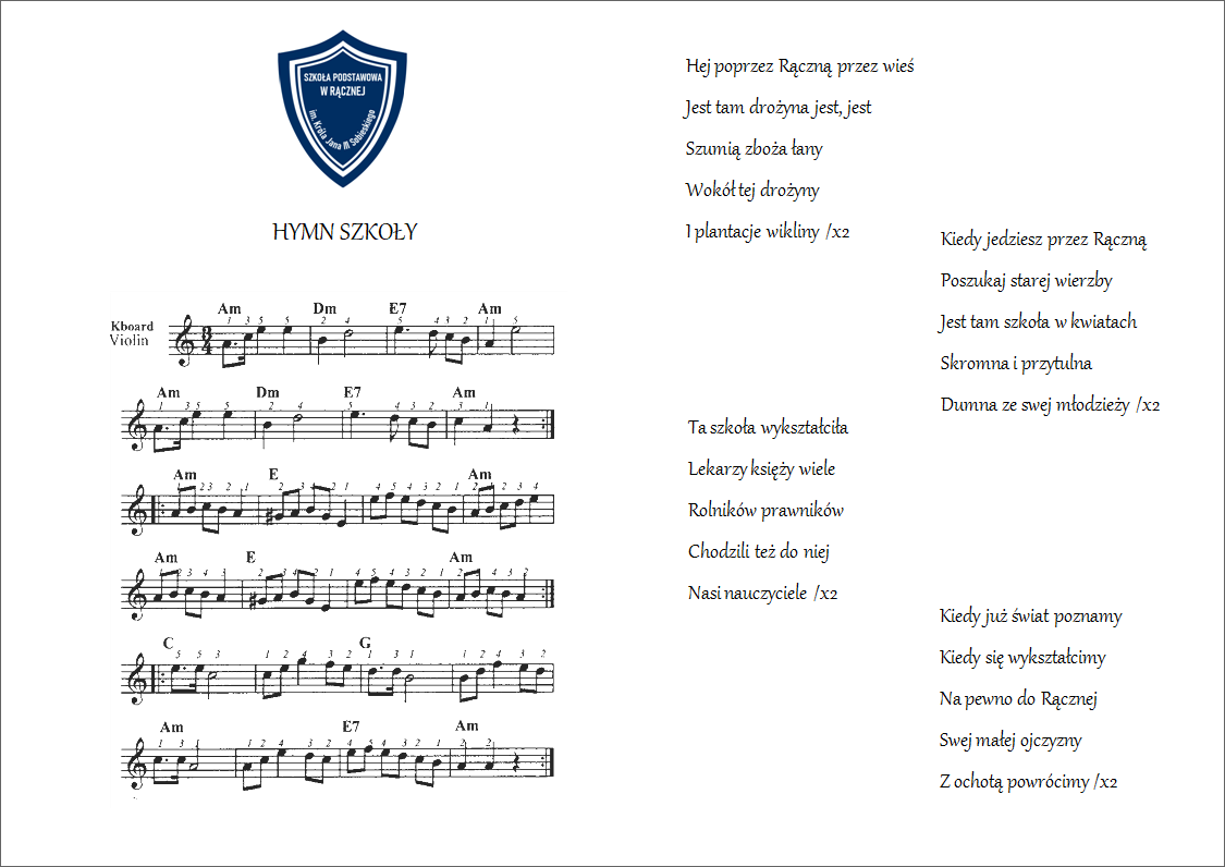 Hymn Szkoły Podstawowej w Rącznej